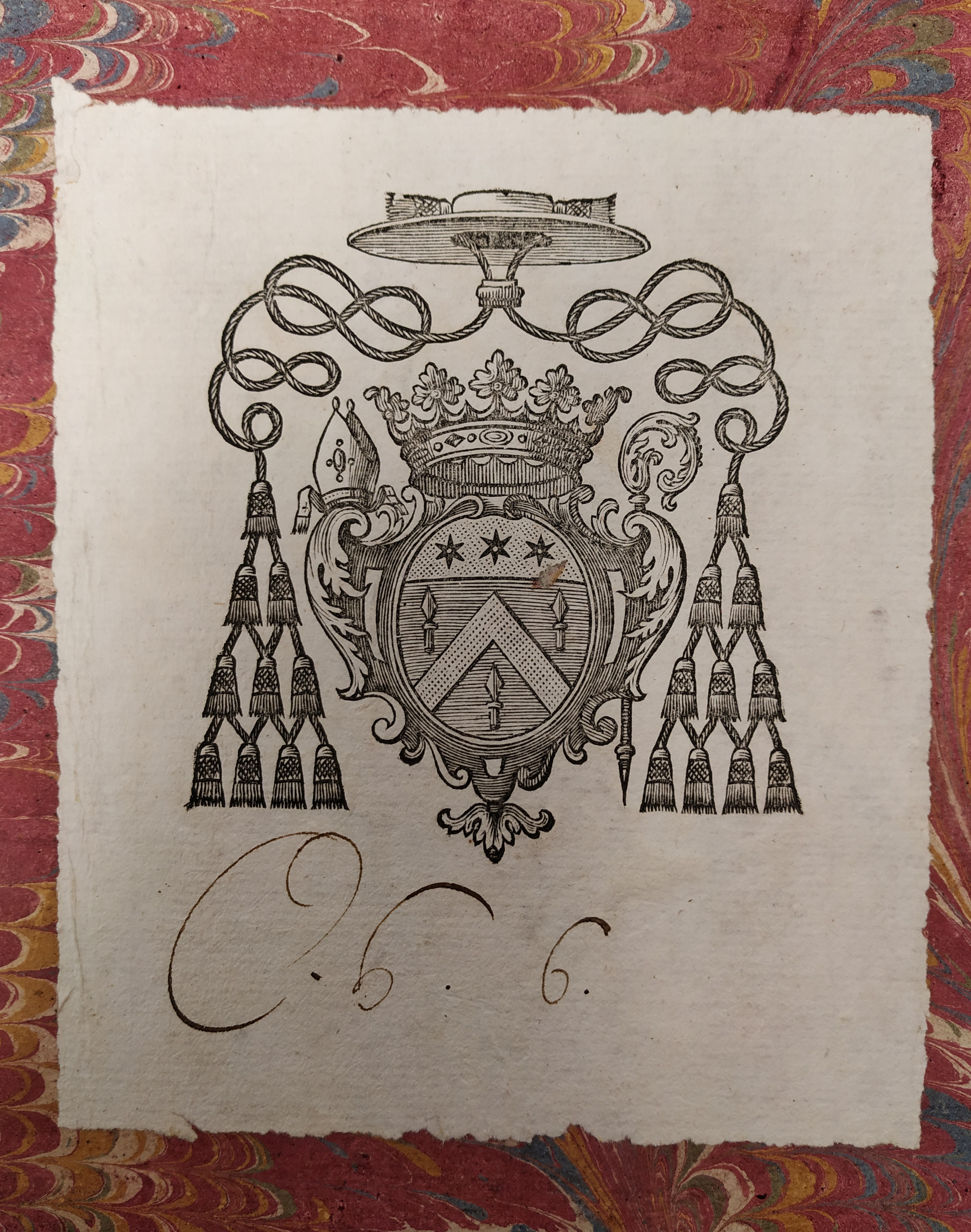 Ex-libris collé sur le contre-plat supérieur d'un manuscrit conservé à la bibliothèque d'Epinal (MS 10)